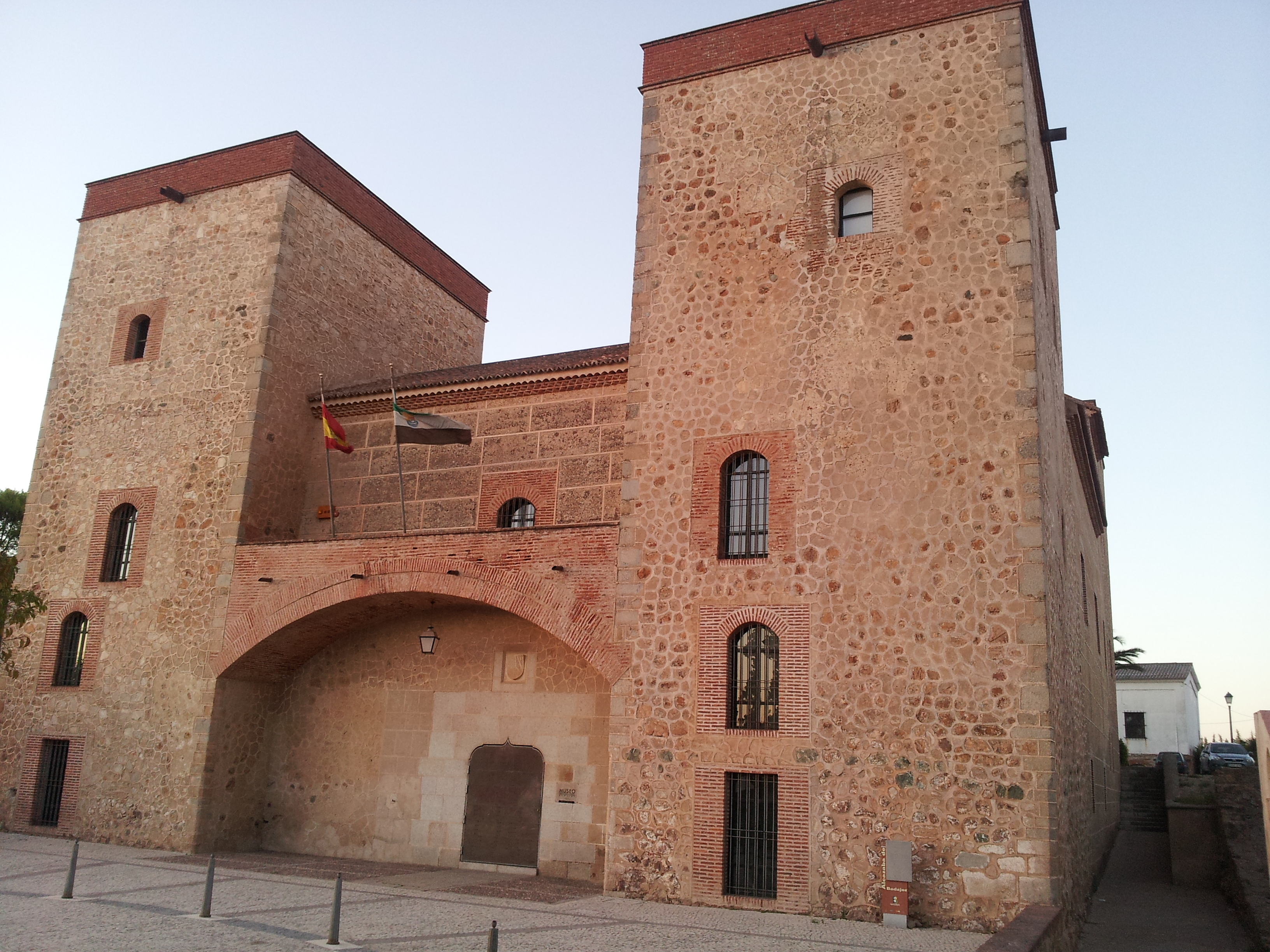 Museo de Badajoz, sito en la Alcazaba